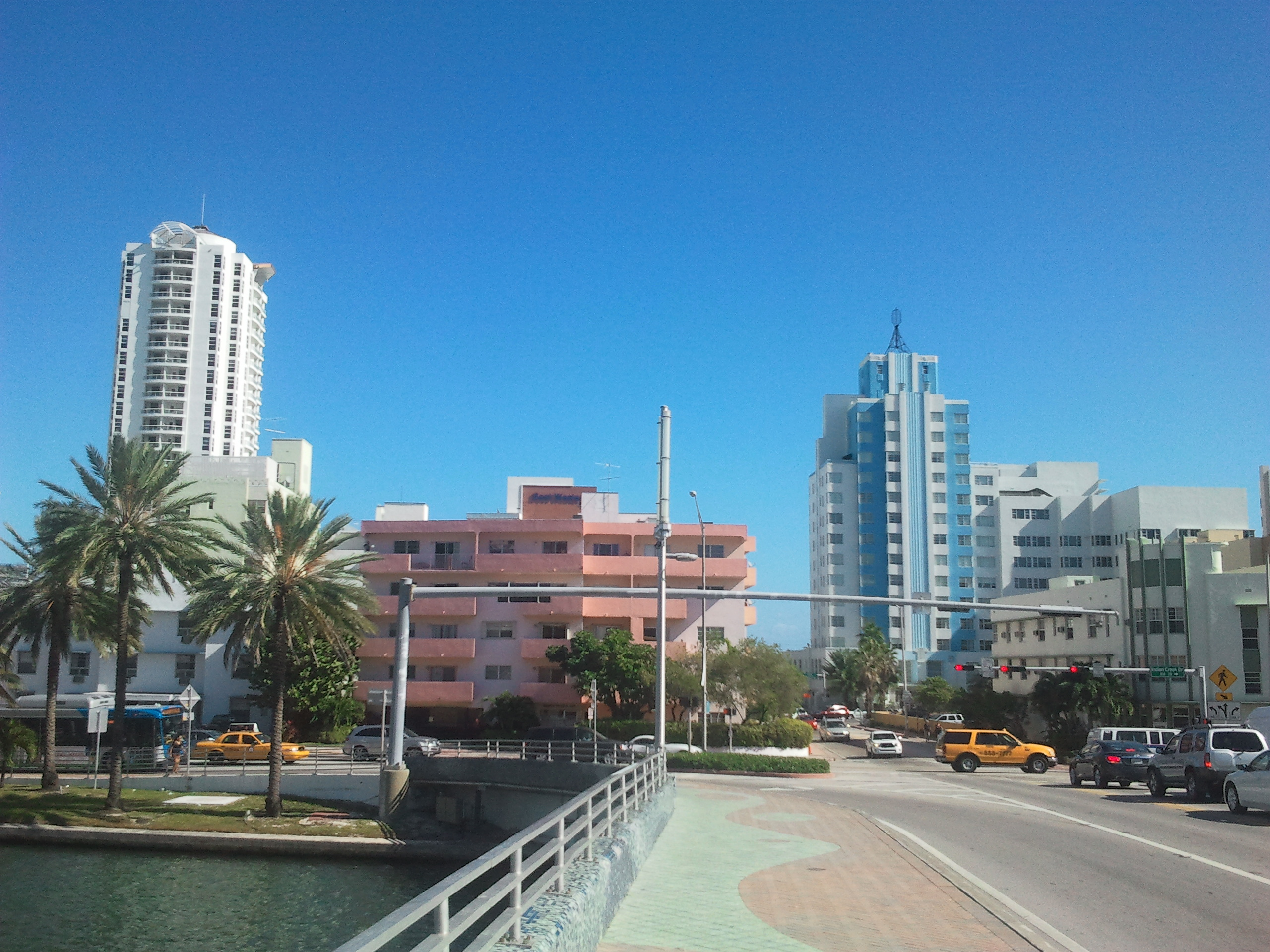 Brücke über den Indian Creek, 41st Street, Miami Beach